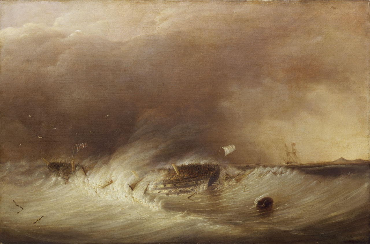 Naufrage du vaisseau britannique HMS Hero au Texel le 25 décembre 1811.